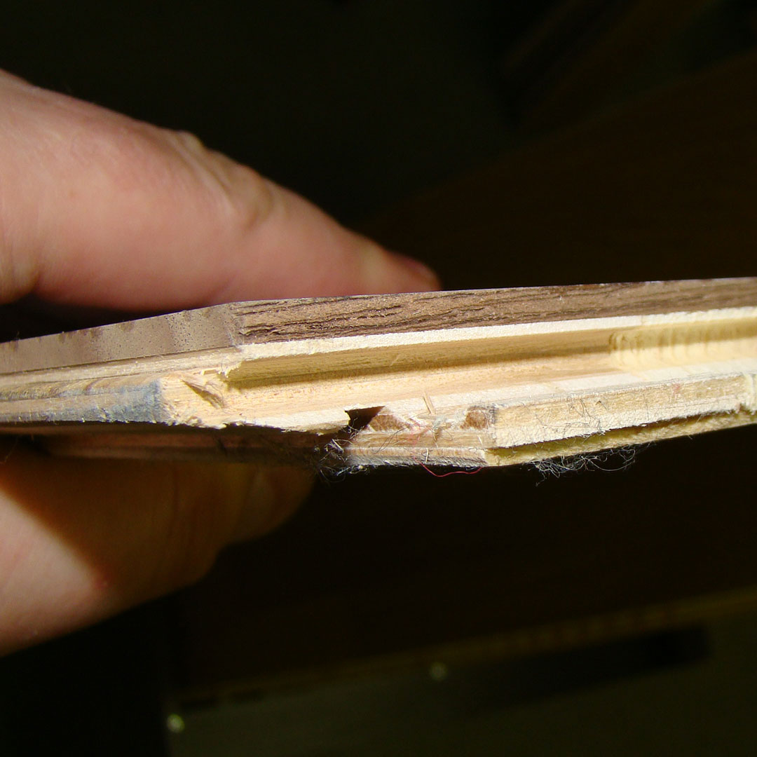 Трехслойная структура паркетной доски